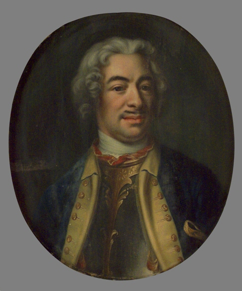 Malcolm Sinclair som löjtnant vid Livgardet, porträtt av Johan Henrik Scheffel, 1728. Bröstbild, ansiktet fas höger. Blå rock med gula uppslag, harnesk. Vit peruk. På dukens baksida med svart färg: “Malcom Sinclair Lieutenant af Garde, aetat 38. Pinxit 1728. Mördades 1739, varandes Major”. Stiftad spännram. Oval förgyllning med överst veckade band och blomguirland, underst tom skriftplatta. Ramlistens bredd 83 mm